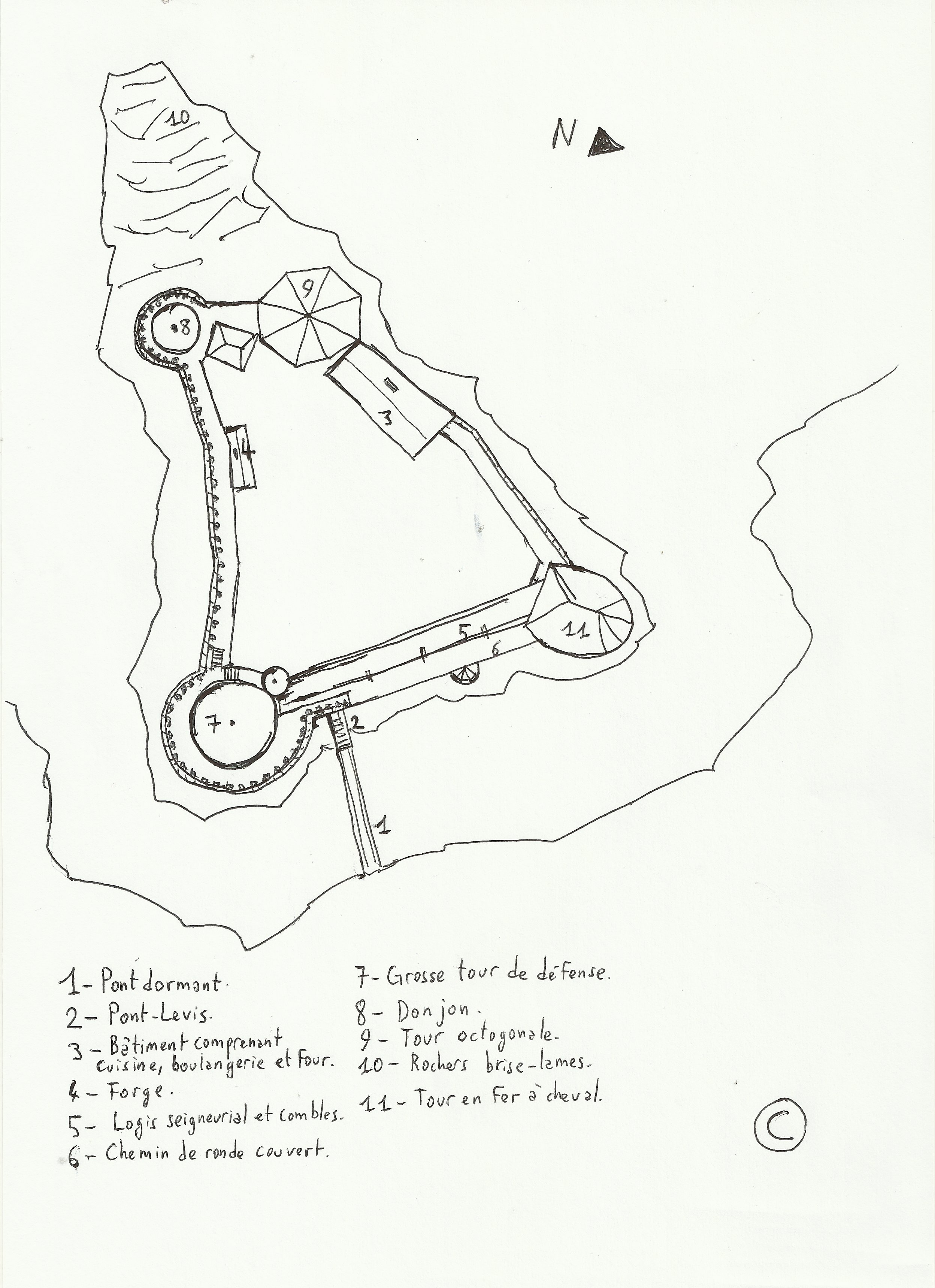 Plan du château médiéval de l'Ile d'Yeu tel qu'il pouvait être au XIVe siècle.